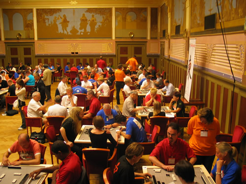 ahjong2005